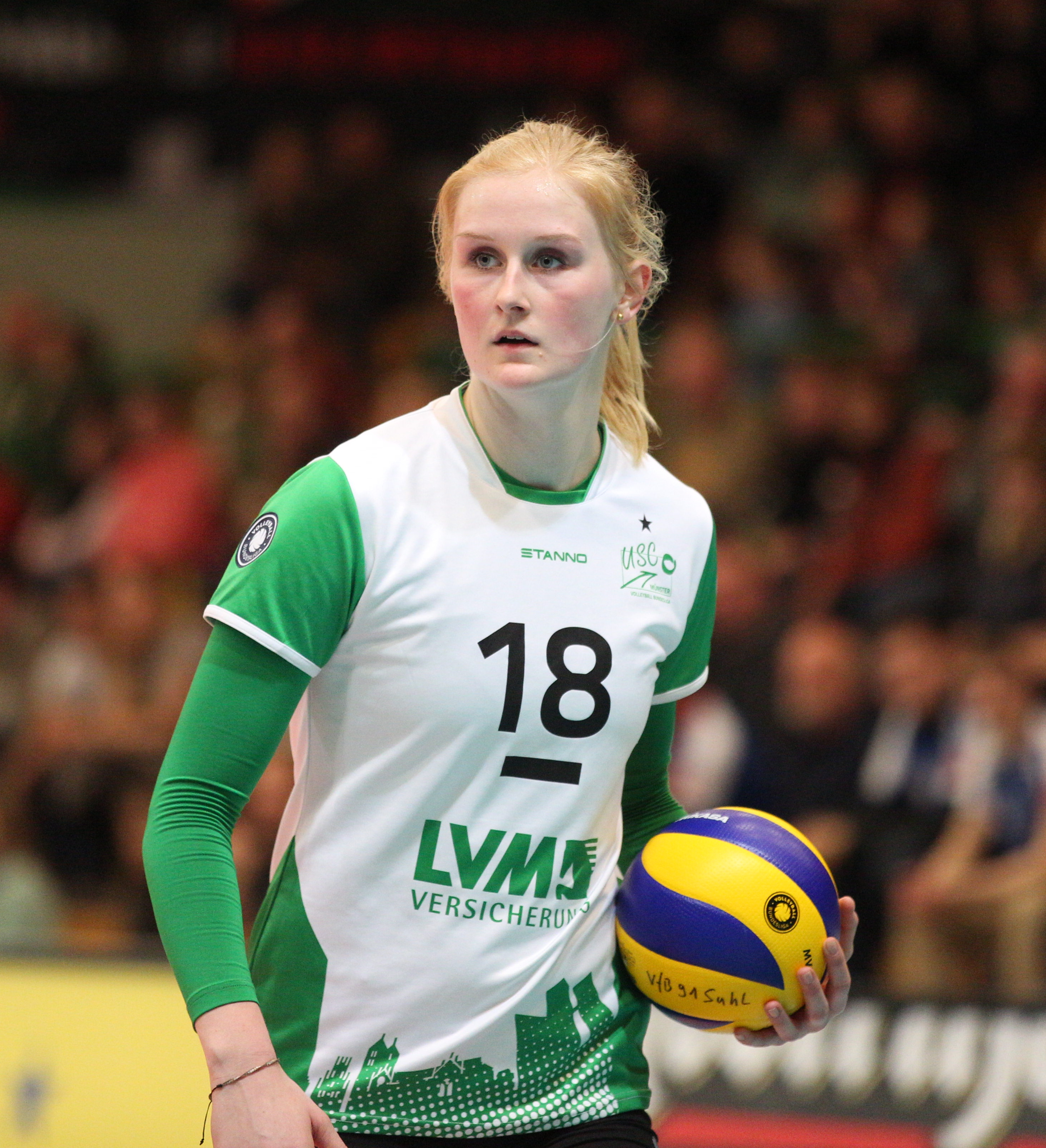 Leonie Schwertmann (USC Münster)